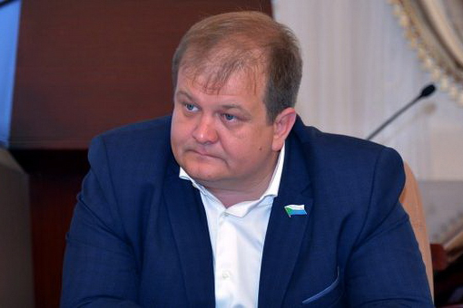 Сергей Вячеславович Безденежных - сенатор